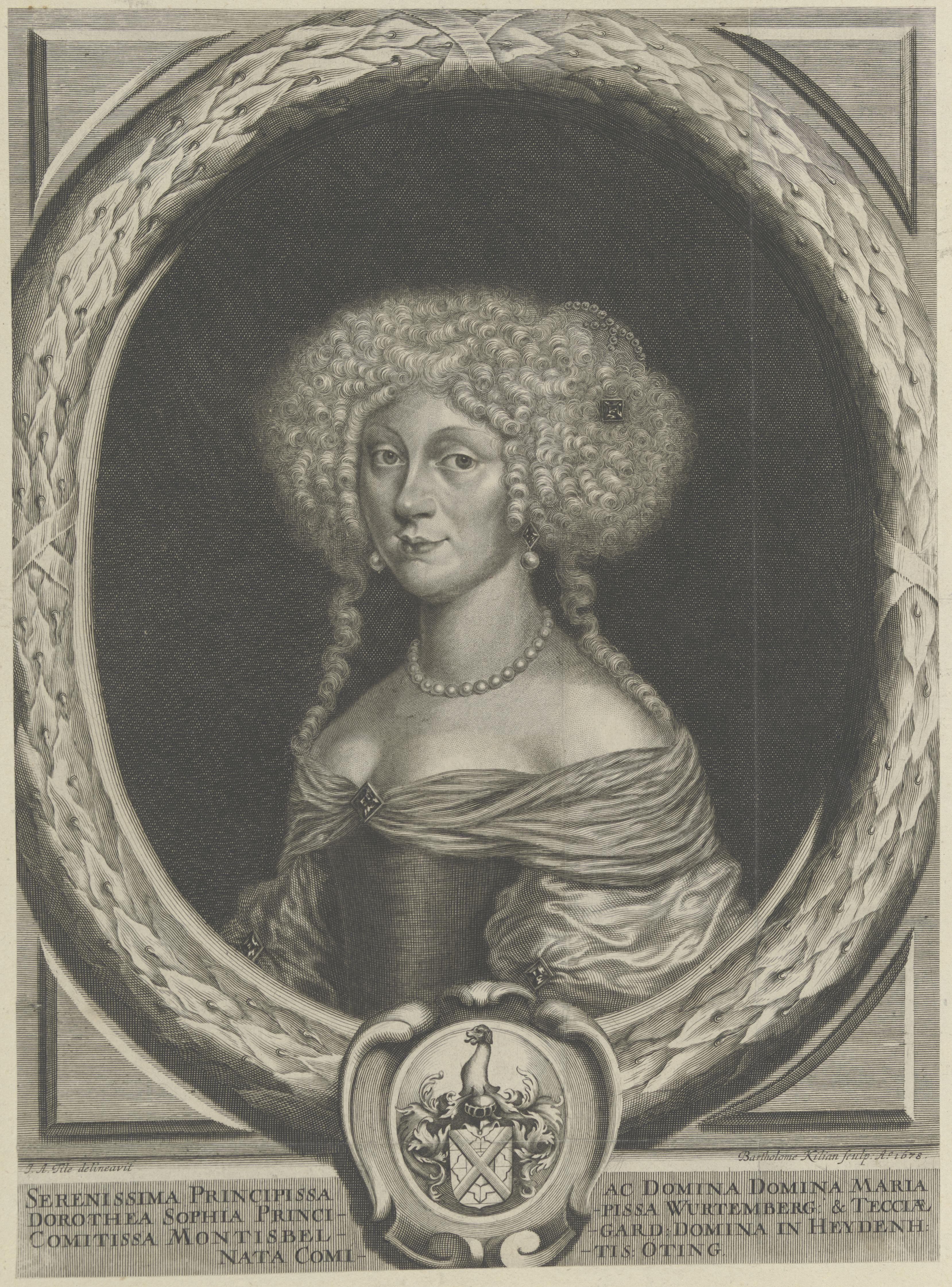 Bildnis der Maria Dorothea Sophia von Württemberg, geb. Oettingen